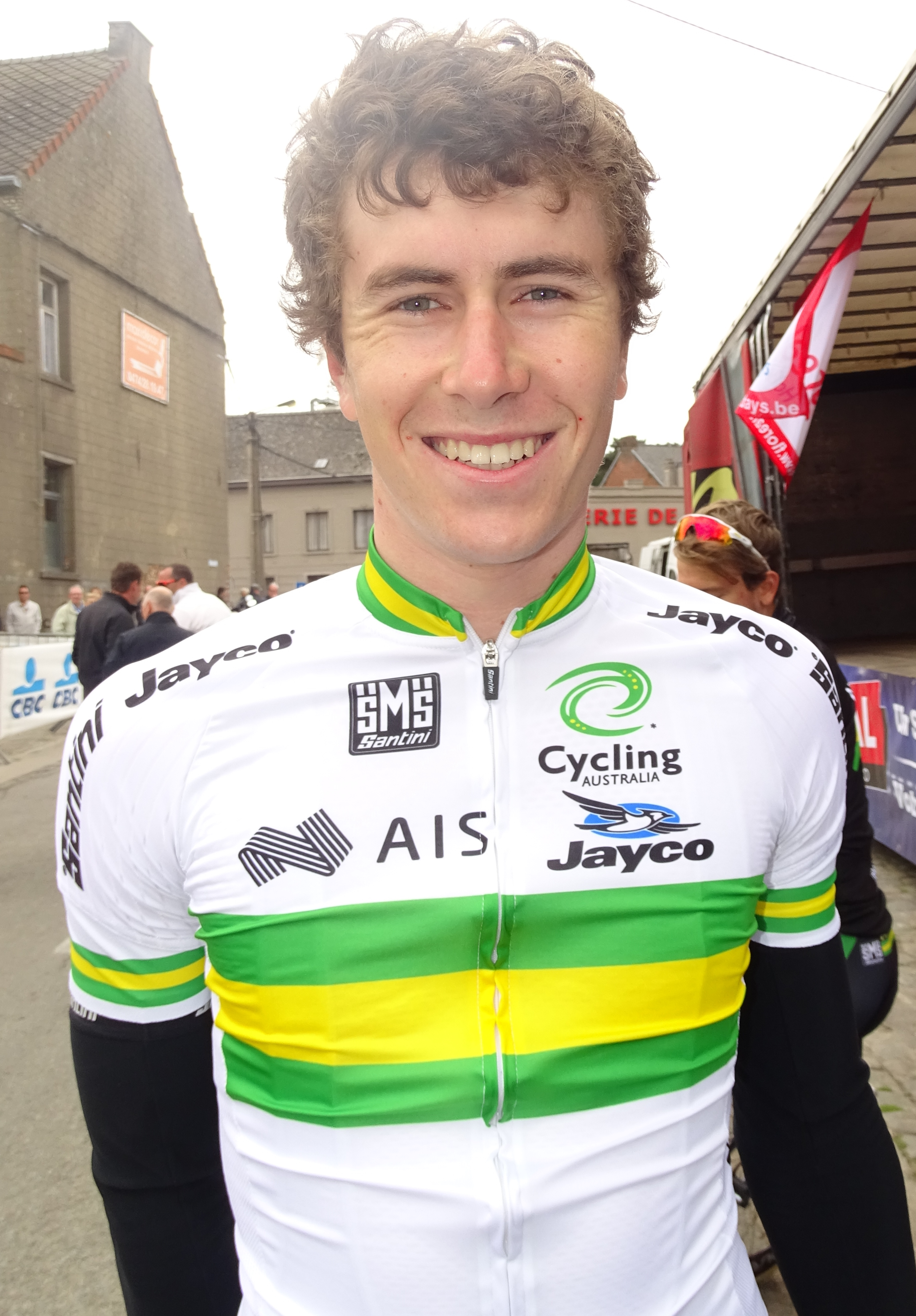 Reportage réalisé le dimanche 15 mai à l'occasion du départ du Grand Prix Criquielion 2016 à Silly, Belgique.